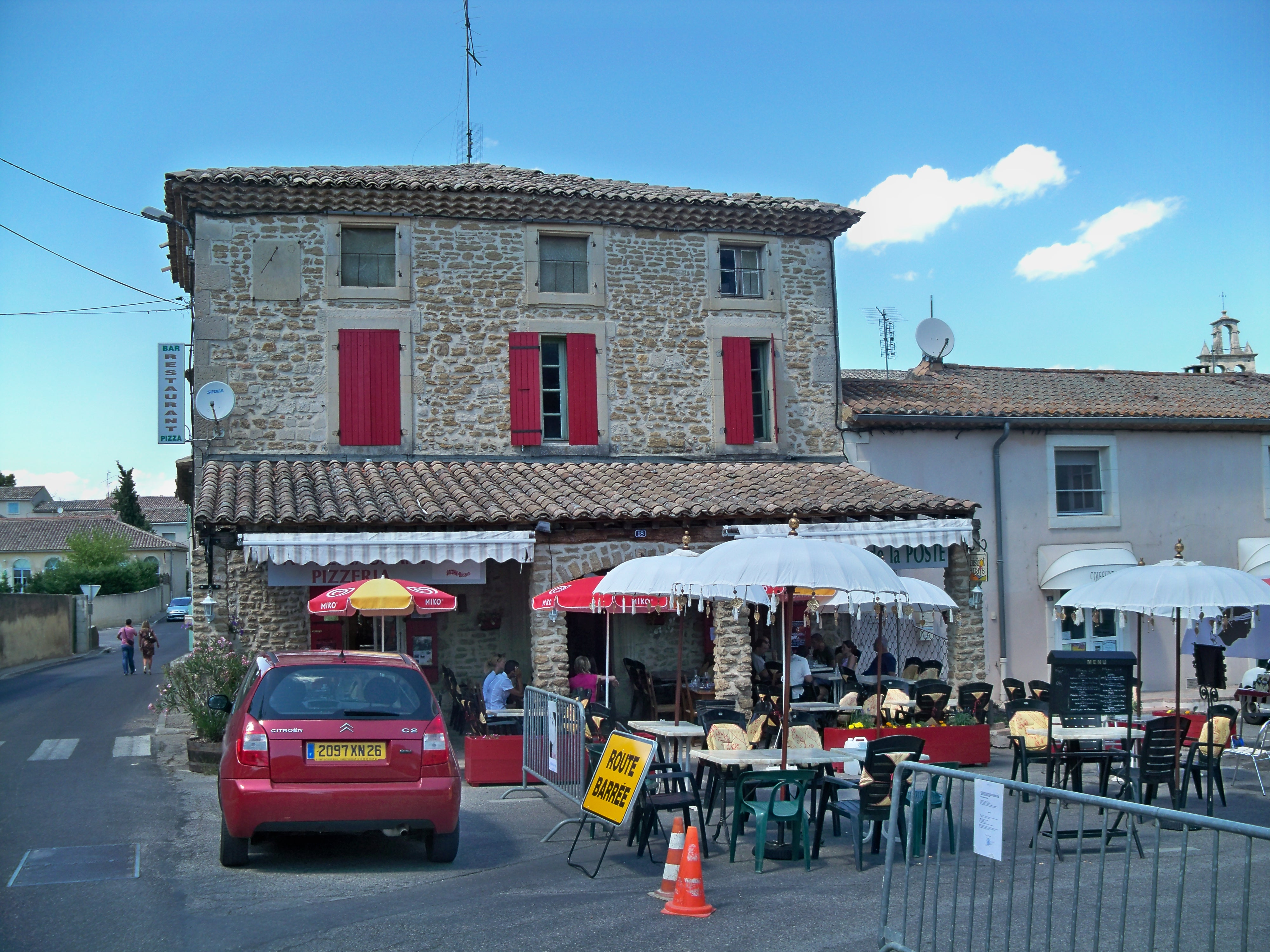 bistrot de Pays à Bouchet, Drôme, France